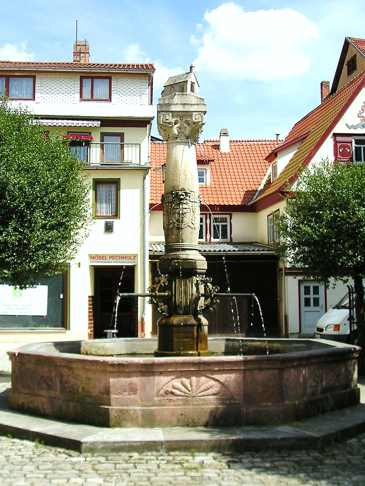 Kapellenbrunnen auf dem Platz der Kapelle in Meiningen